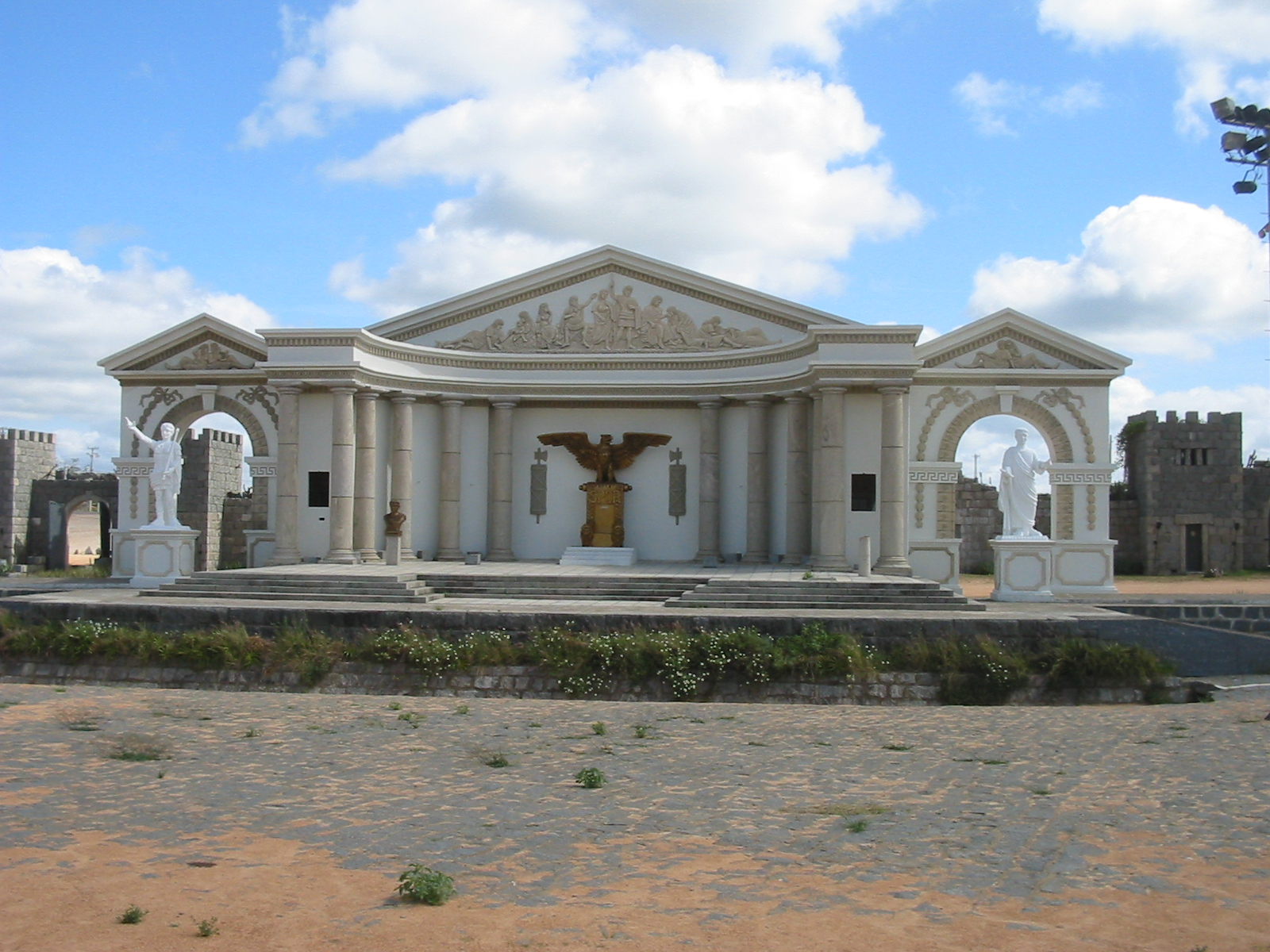 Nova Jerusalém (Pernambuco), Brasil. Fórum de Pilatos.